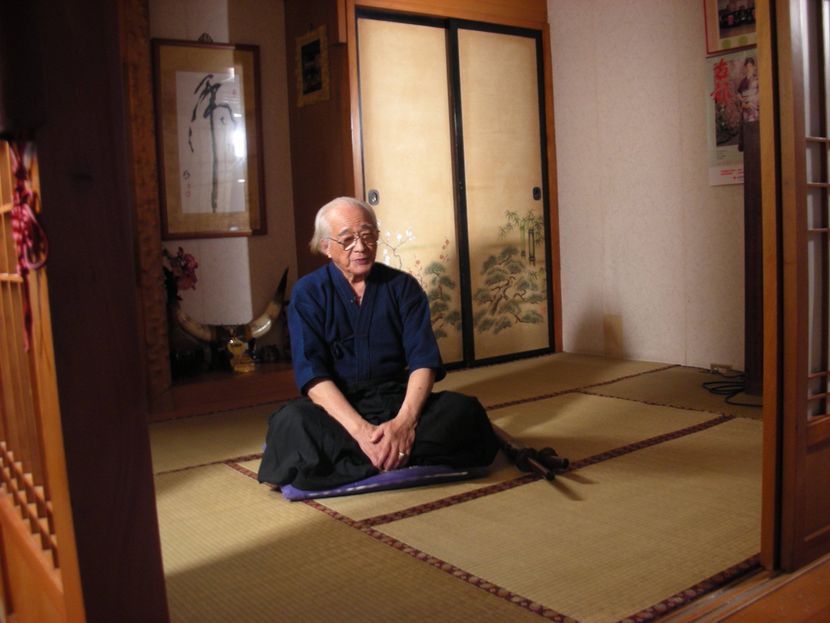 台灣戰後劍道運動推手袁埏烽2008年12月居家照。